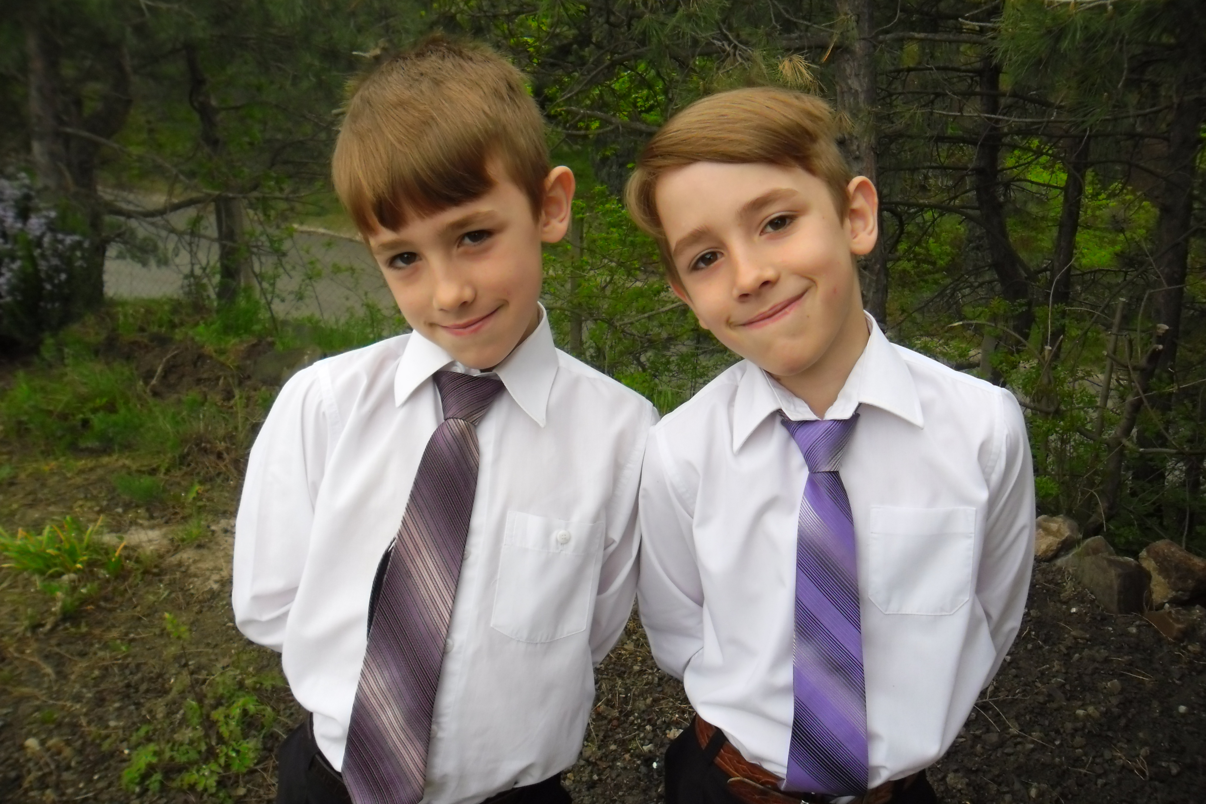 Хлопчики-близнята